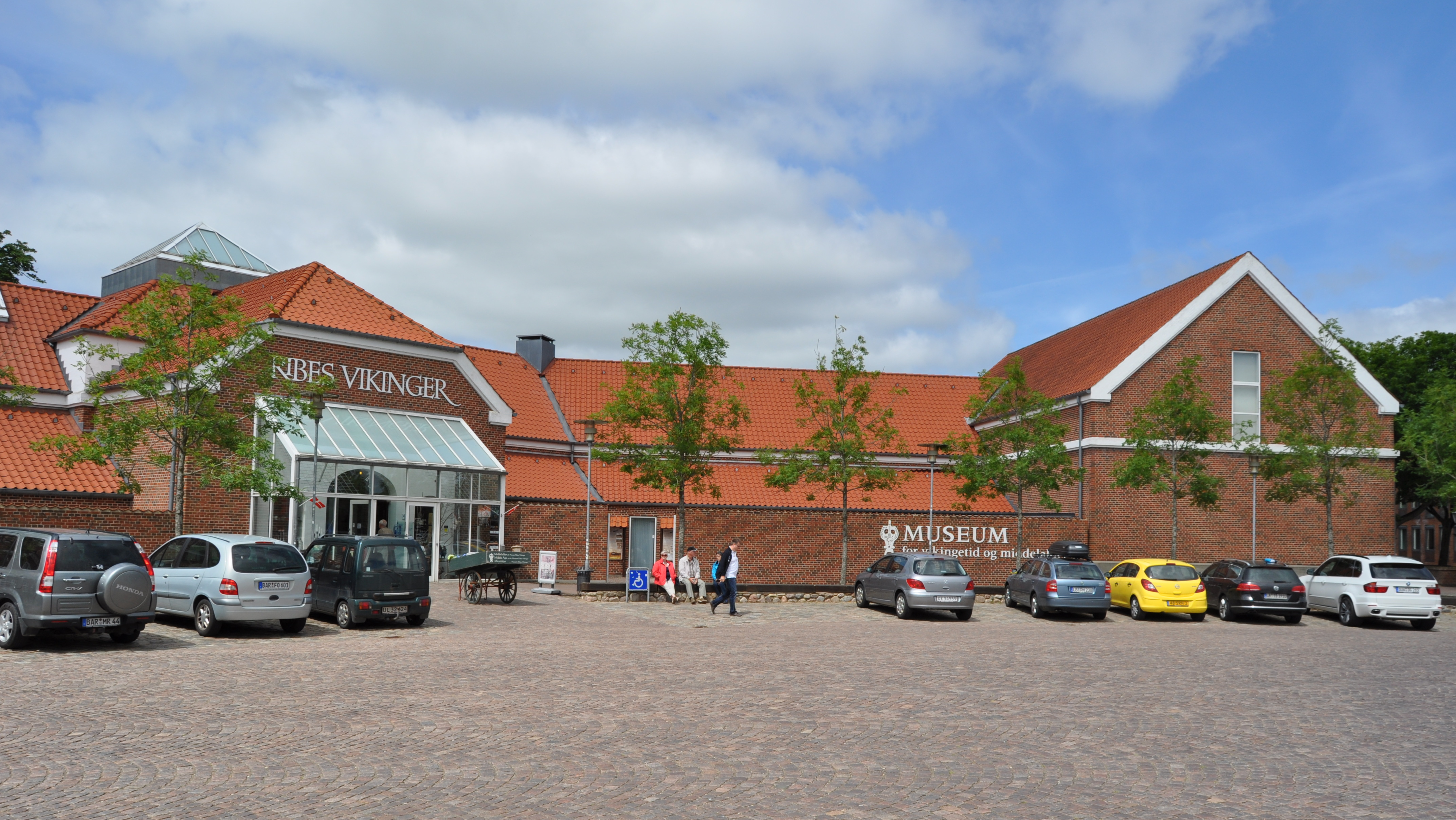 Das Wikingermuseum in Ribe